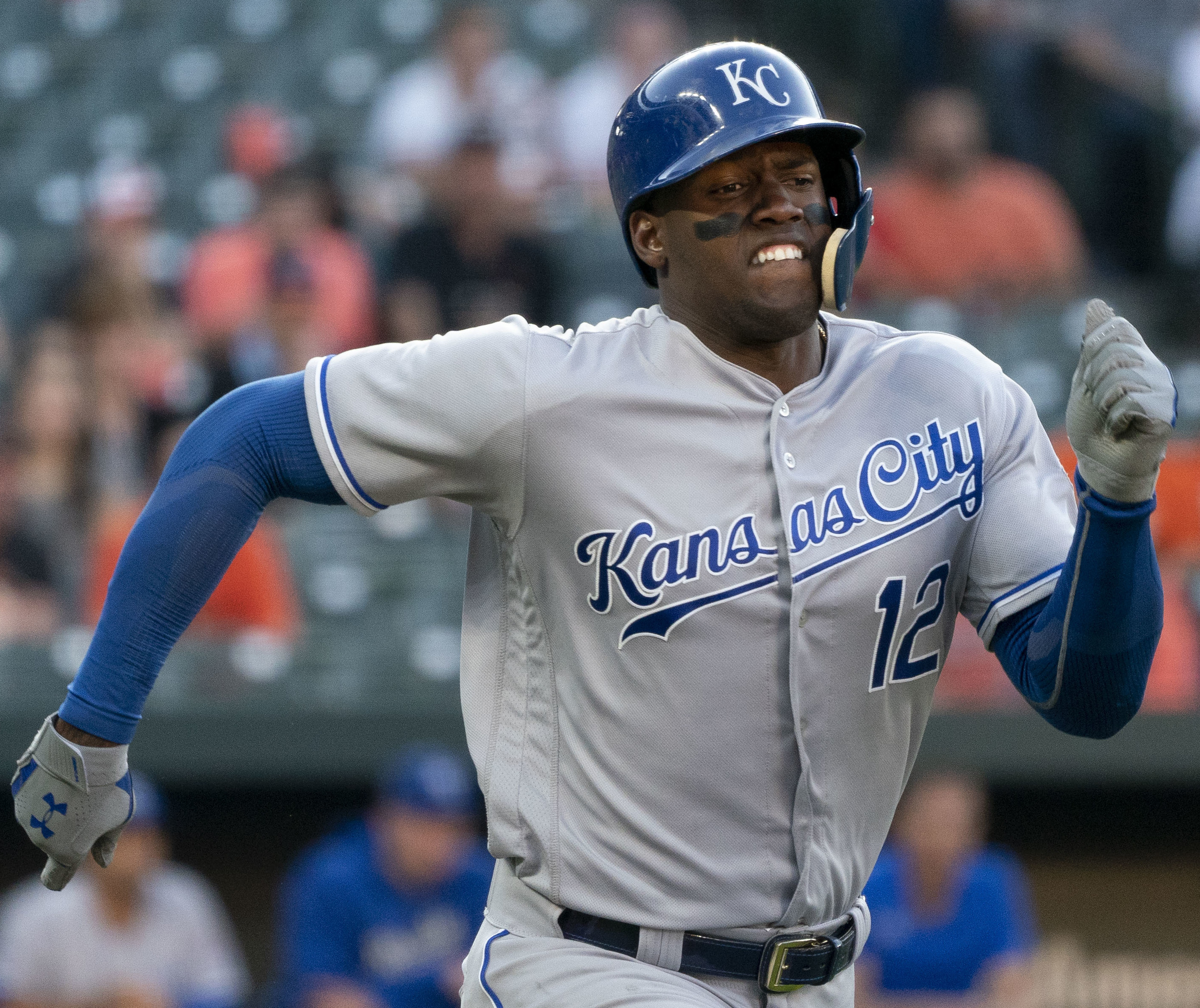 Royals at Orioles 5/9/18